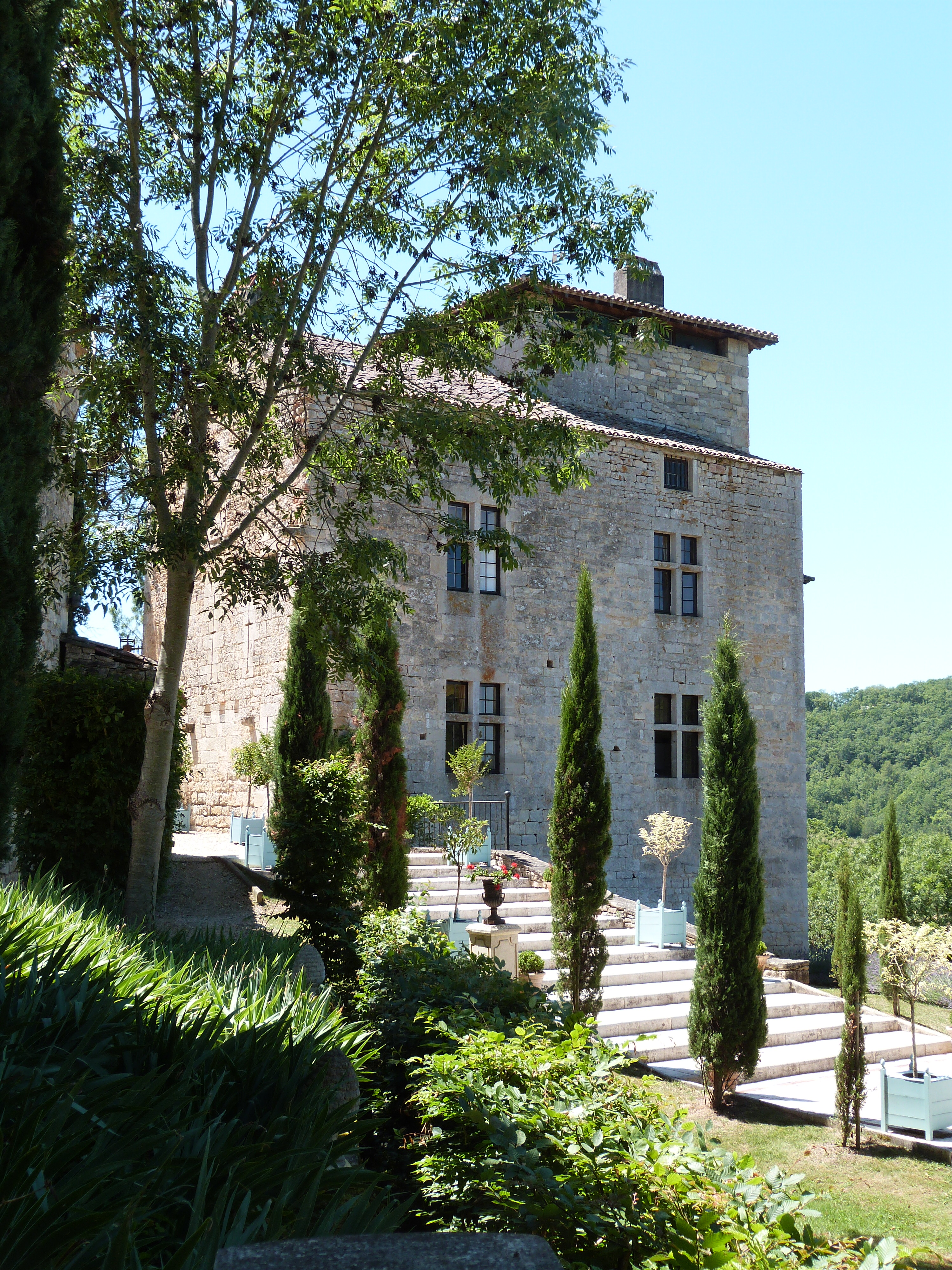 Château de Cas, (Inscrit, 1984) .